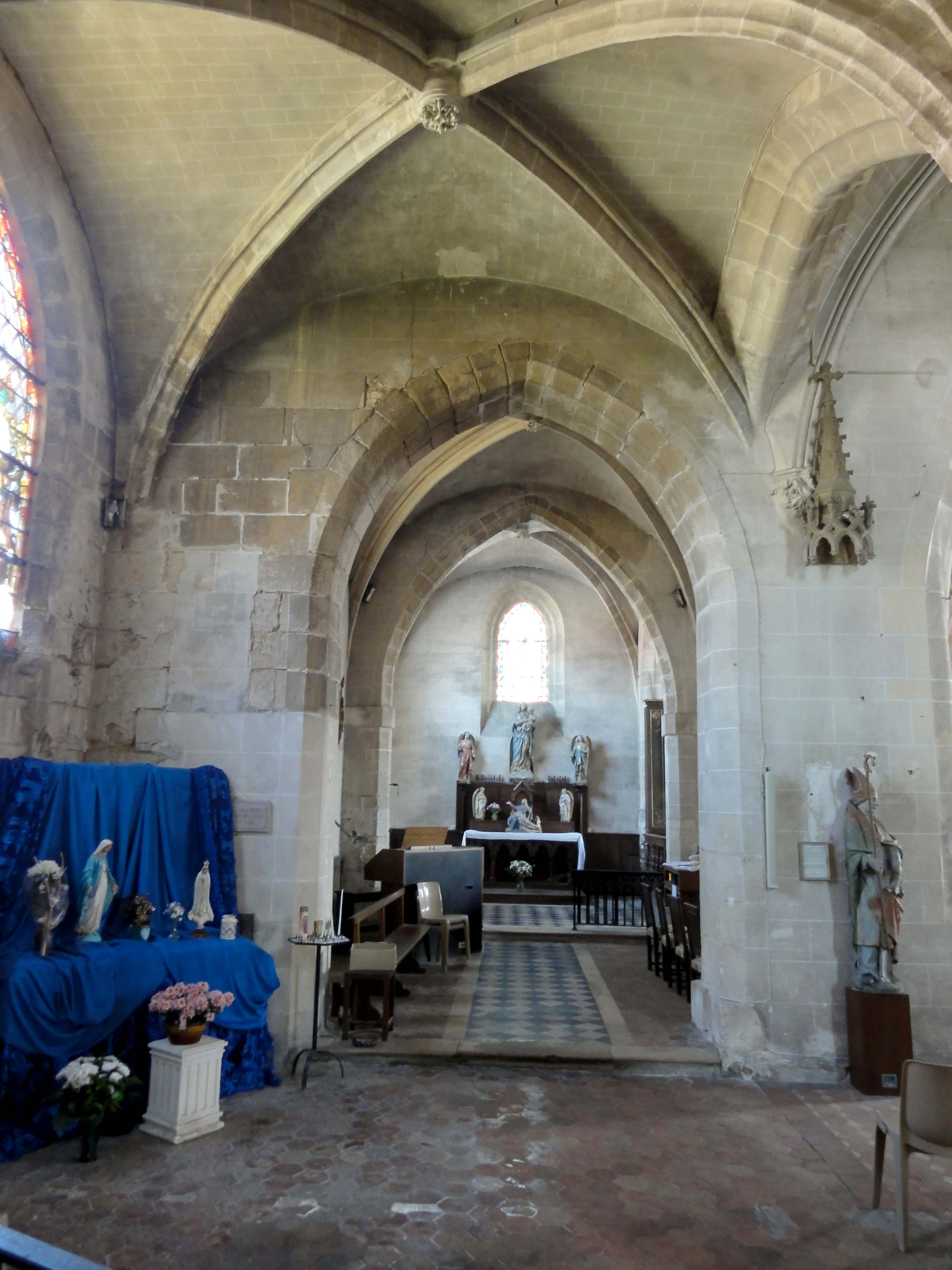 Intérieur de l'église (voir titre).